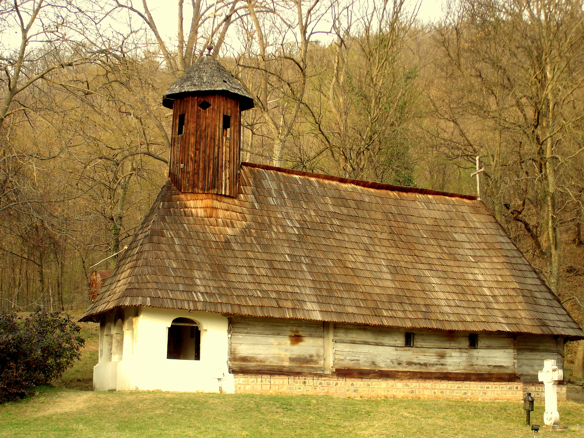 Muzeul Memorial „Nicolae Bălcescu”, Biserica de lemn "Adormirea Maicii Domnului"- Gâltofani 03